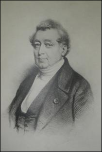 Henry Dewandre